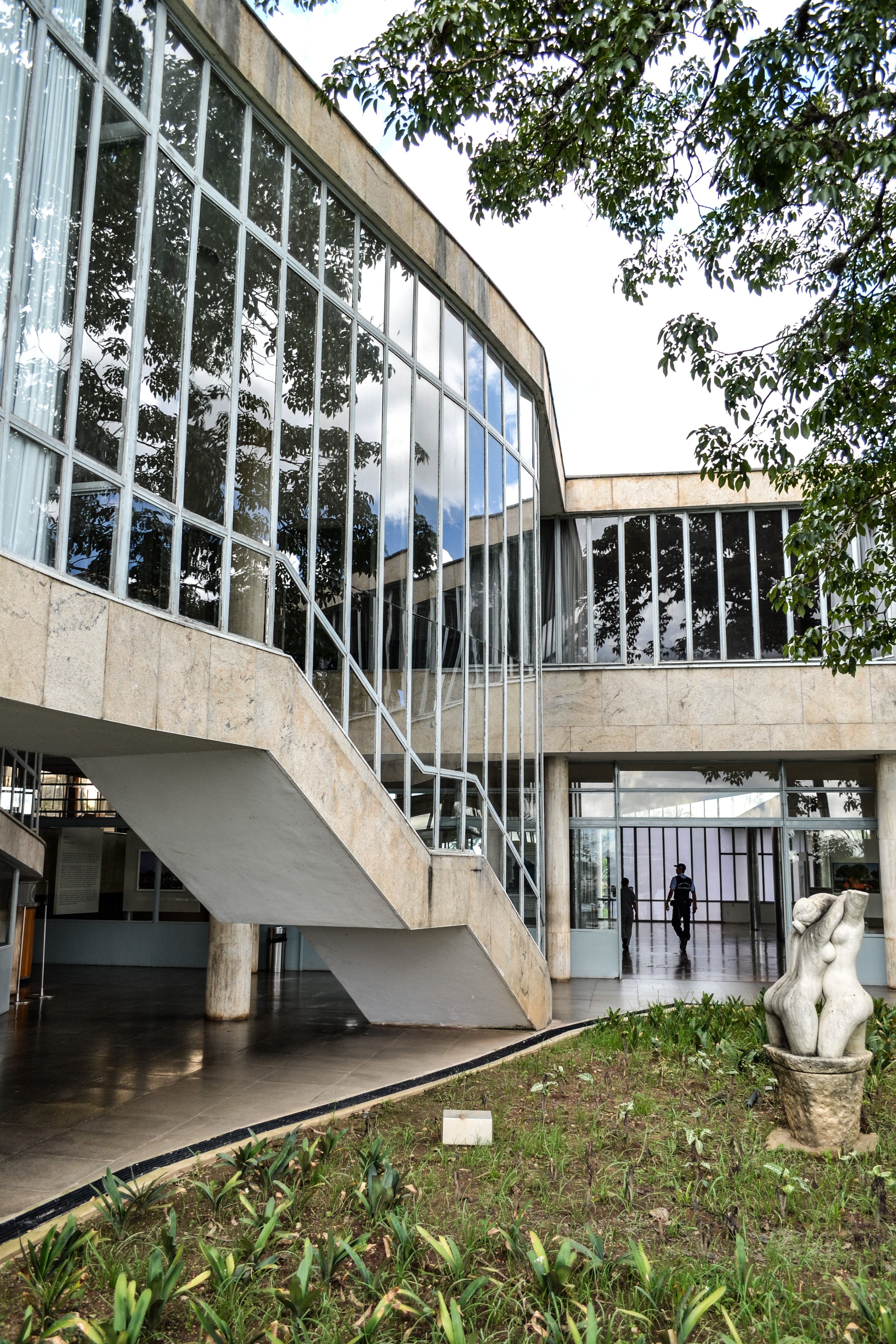 Pampulha: conjunto arquitetônico e paisagístico